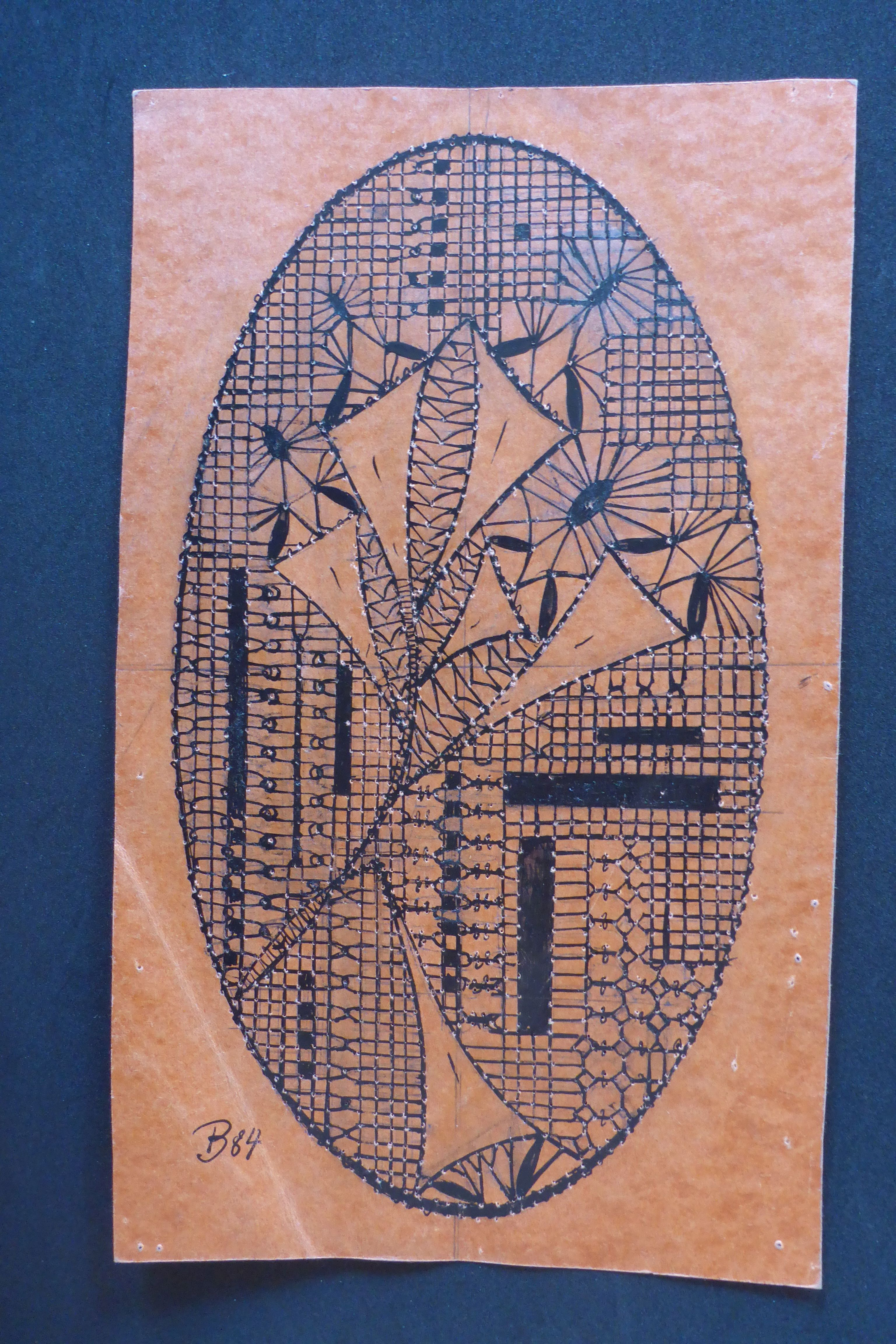 Klöppelbrief